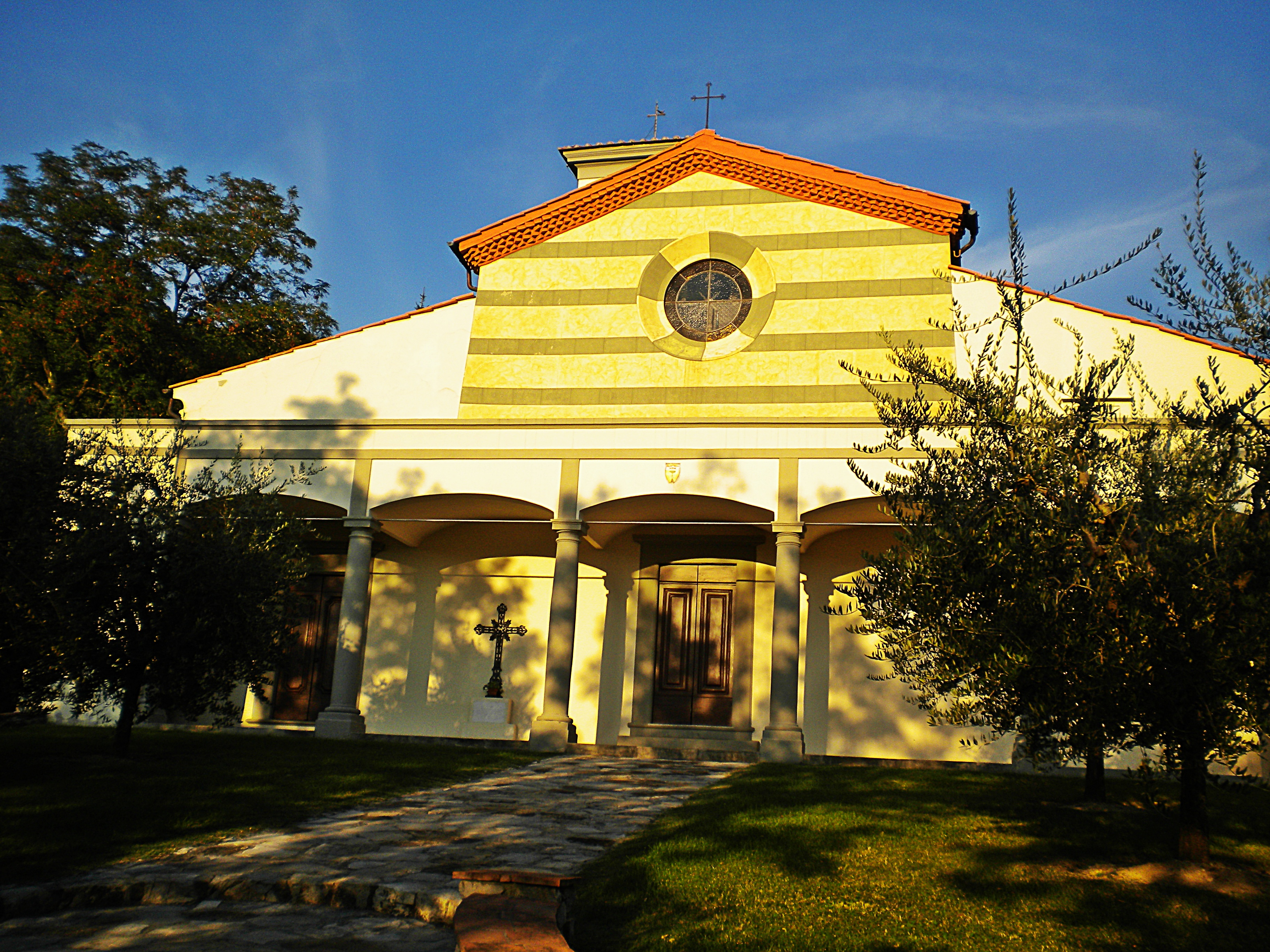 Santi Vito e Modesto